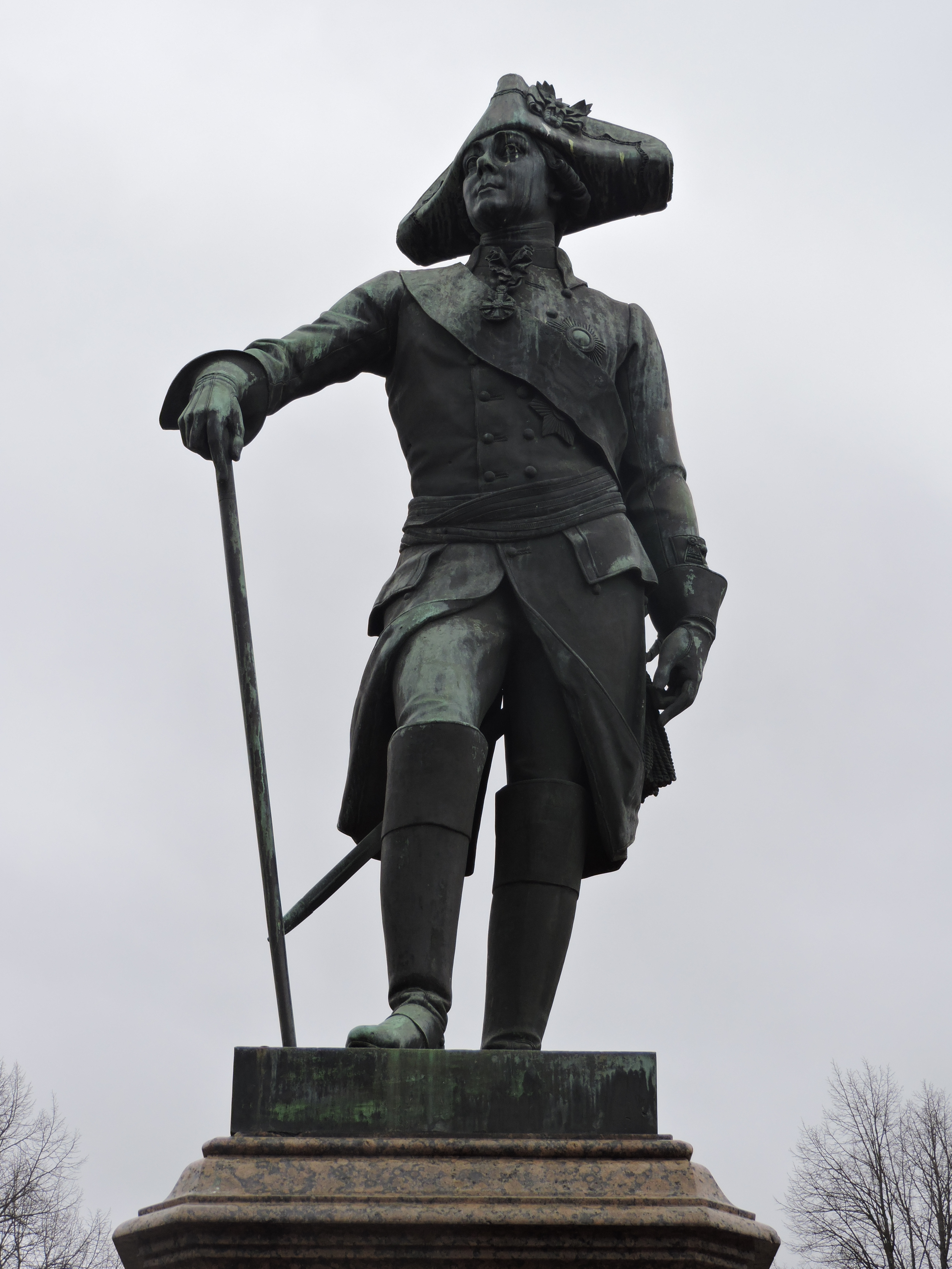 Павел Первый (Гатчина)